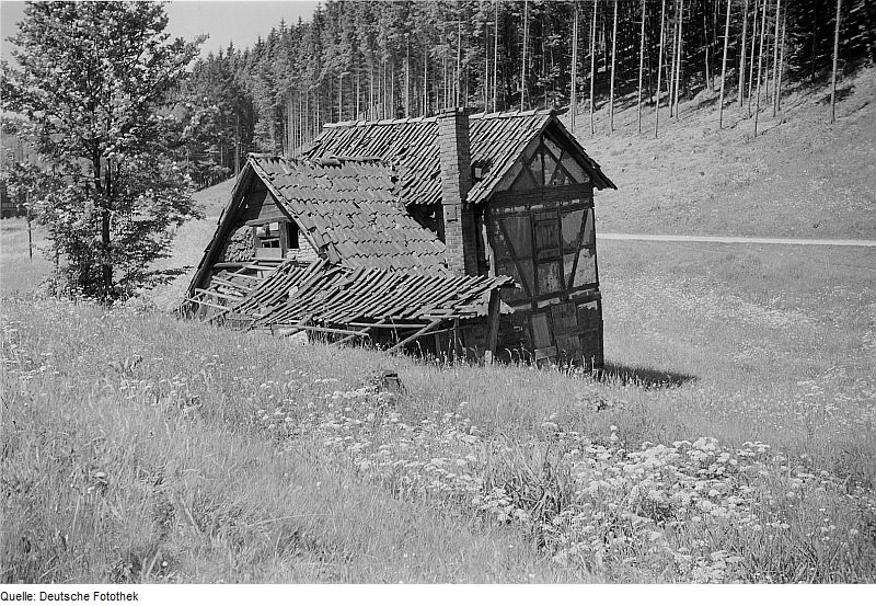 Original image description from the Deutsche FotothekThüringer Wald. Landschaft mit halb verfallenen Gebäude Die oberste Schleifmühle (Schleifkote) im Schleifkotengrund von Steinbach im Wartburgkreis. Hier wurden Messerklingen geschliffen.